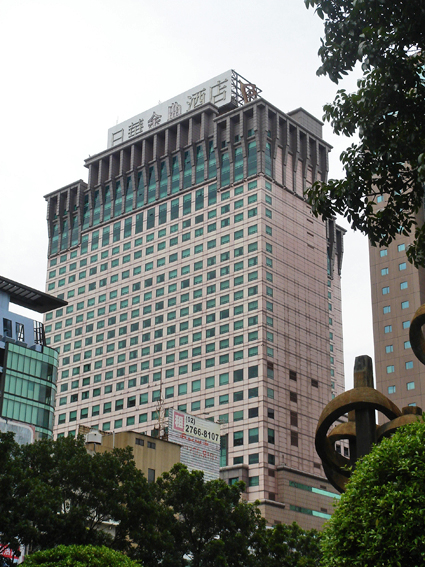 台灣的台中金典酒店。